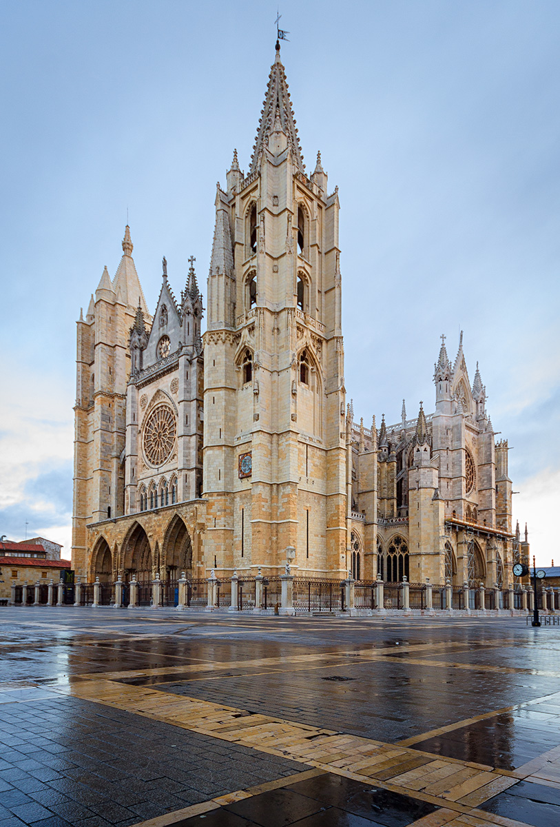 Catedral Gótica de Santa María, en León. León Cathedral Native nameCatedral de LeónLocationLeón, (Spain)Coordinates42° 35′ 58″ N, 5° 34′ 00″ W EstablishedMiddle AgeWeb page control : Q175874 VIAF: 148926357 LCCN: n80144988 BIC: RI-51-0000001 GND: 4392441-4 SUDOC: 033212880 WorldCat institution QS:P195,Q175874